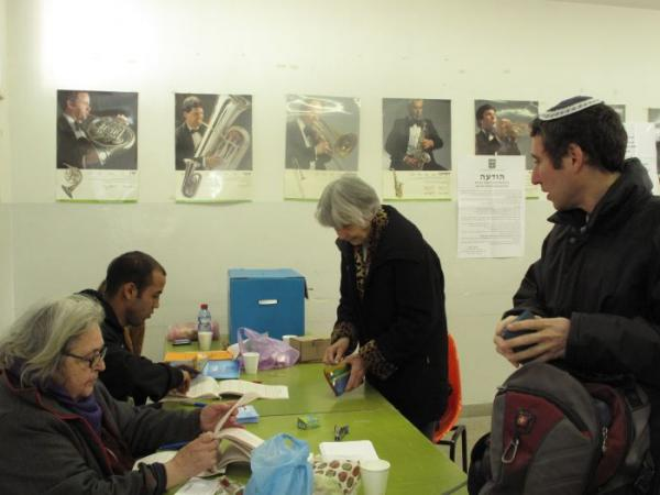 קלפי בירושלים